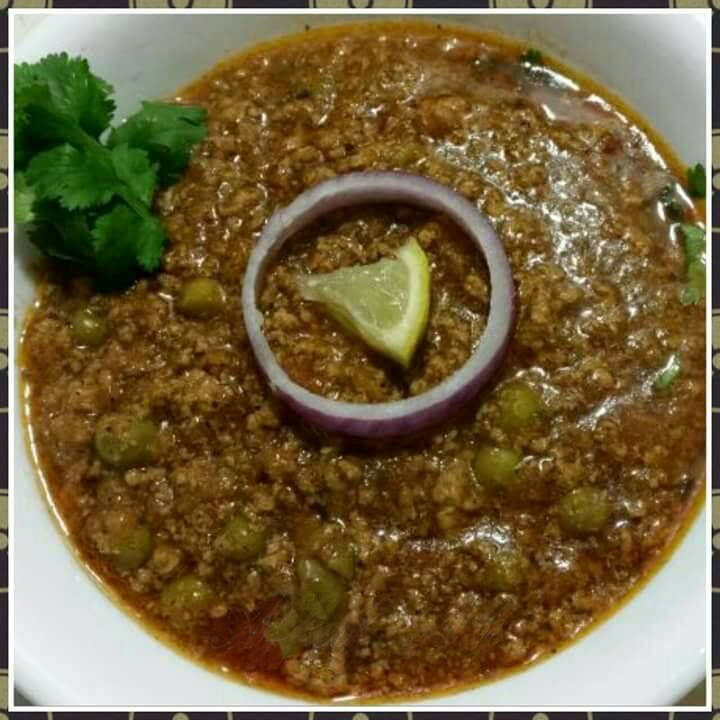 Mince cooked with fresh green peas and spices, with pepper powder being used dominantly.